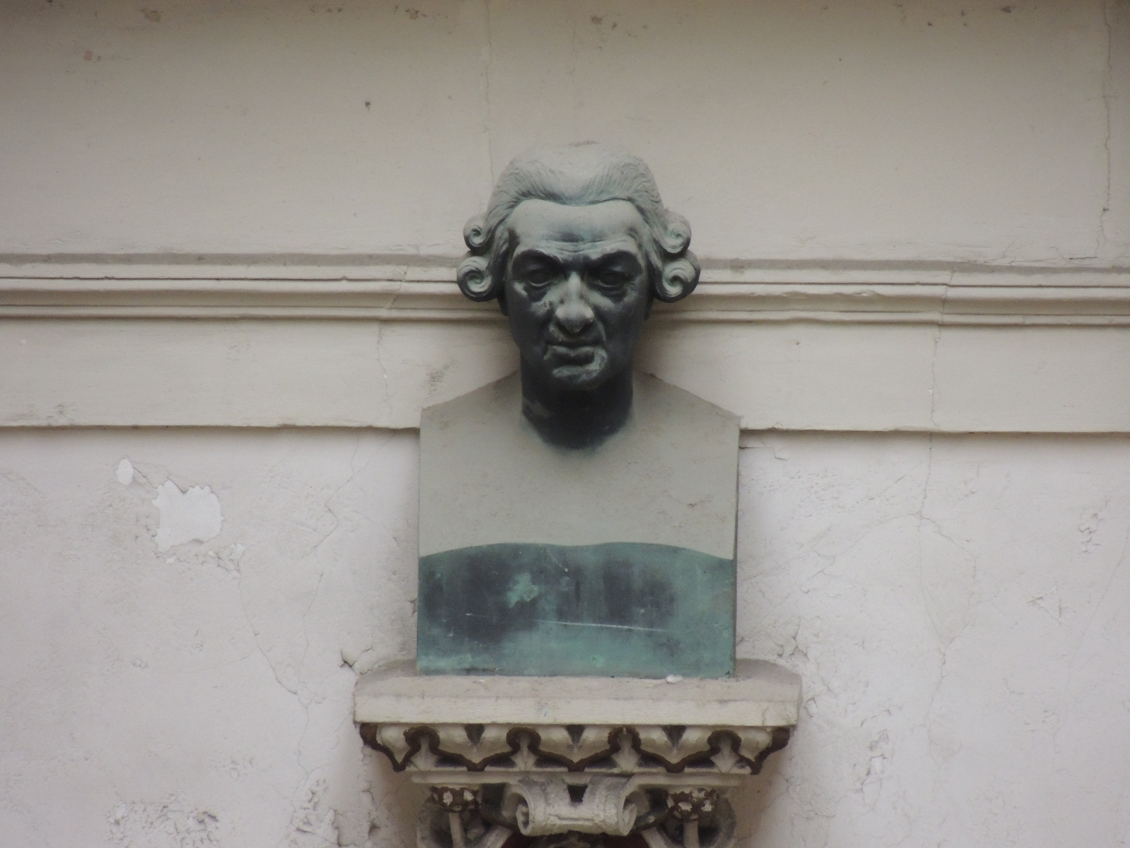 Passage Pommeraye, Nantes, France. Buste de Pierre Haudaudine, dans la galerie de la Fosse, œuvre de Jean-Baptiste Joseph Debay (1802-1862).